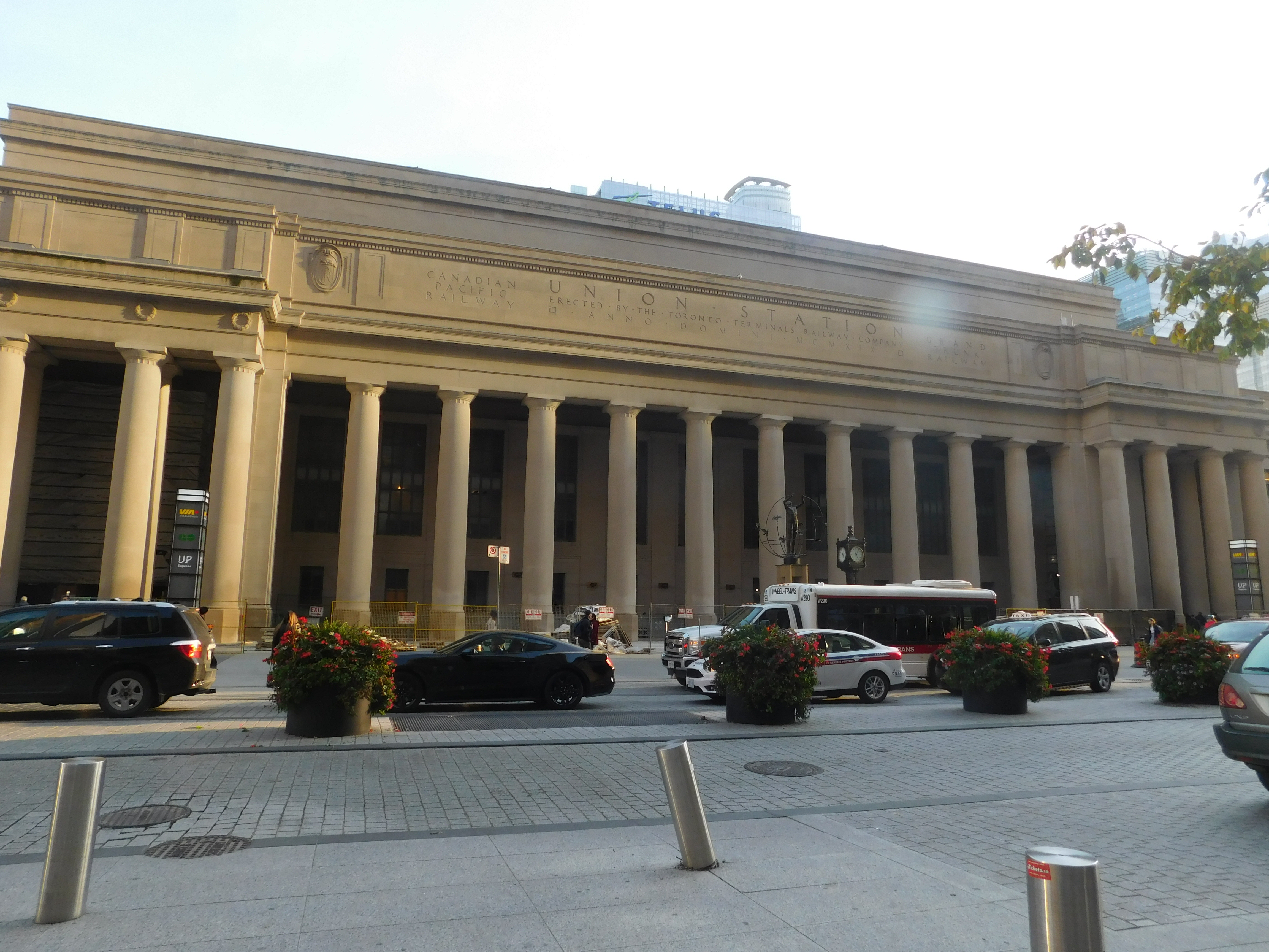 Toronto, Ontario